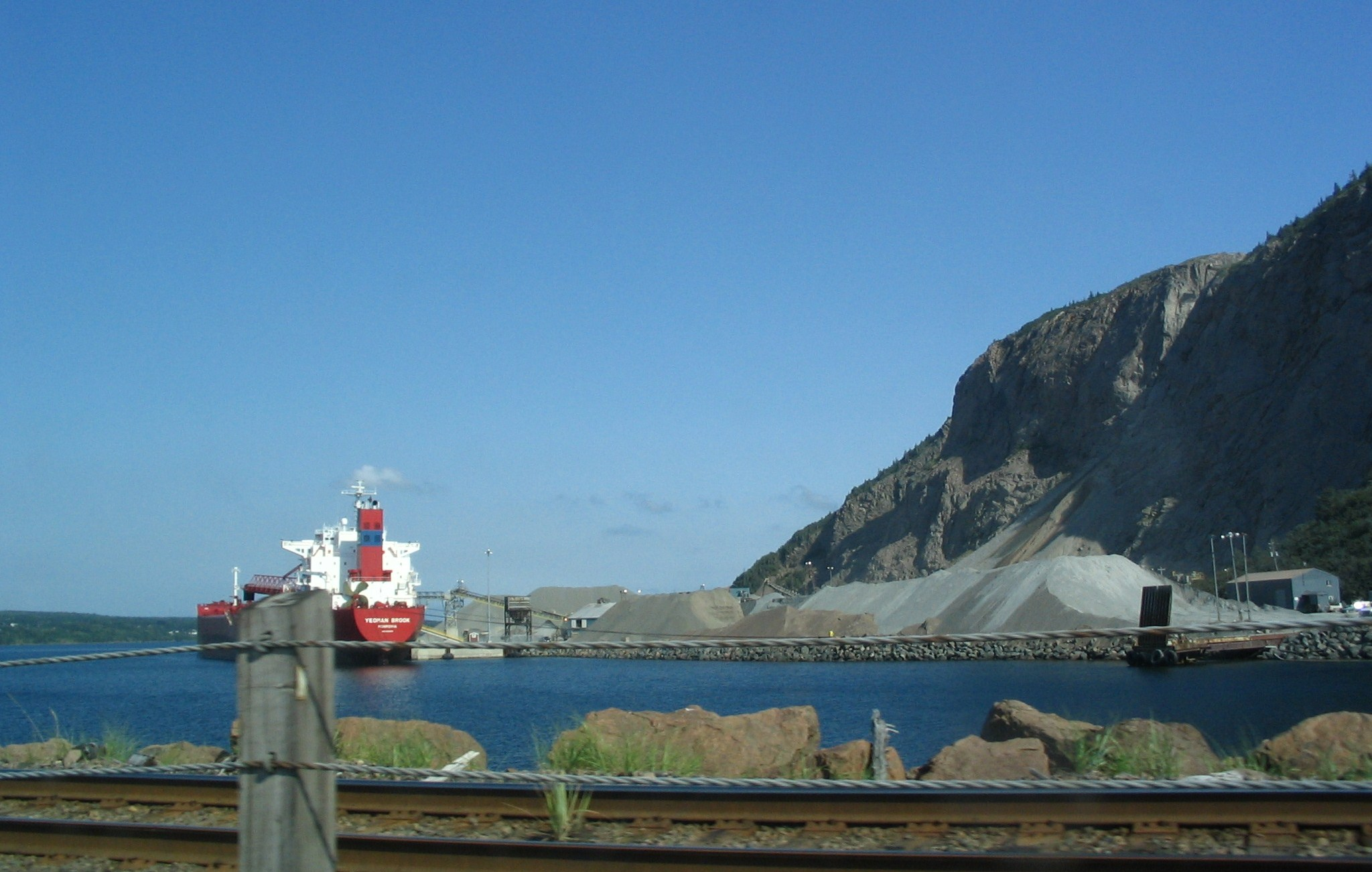 Bateau de Canada Steamship Lines chargant du minerais. Photo prise de la chaussée Canso, en Nouvelle-Écosse. Porcupine Mountain aggregate quarry, Strait of Canso, Nova Scotia